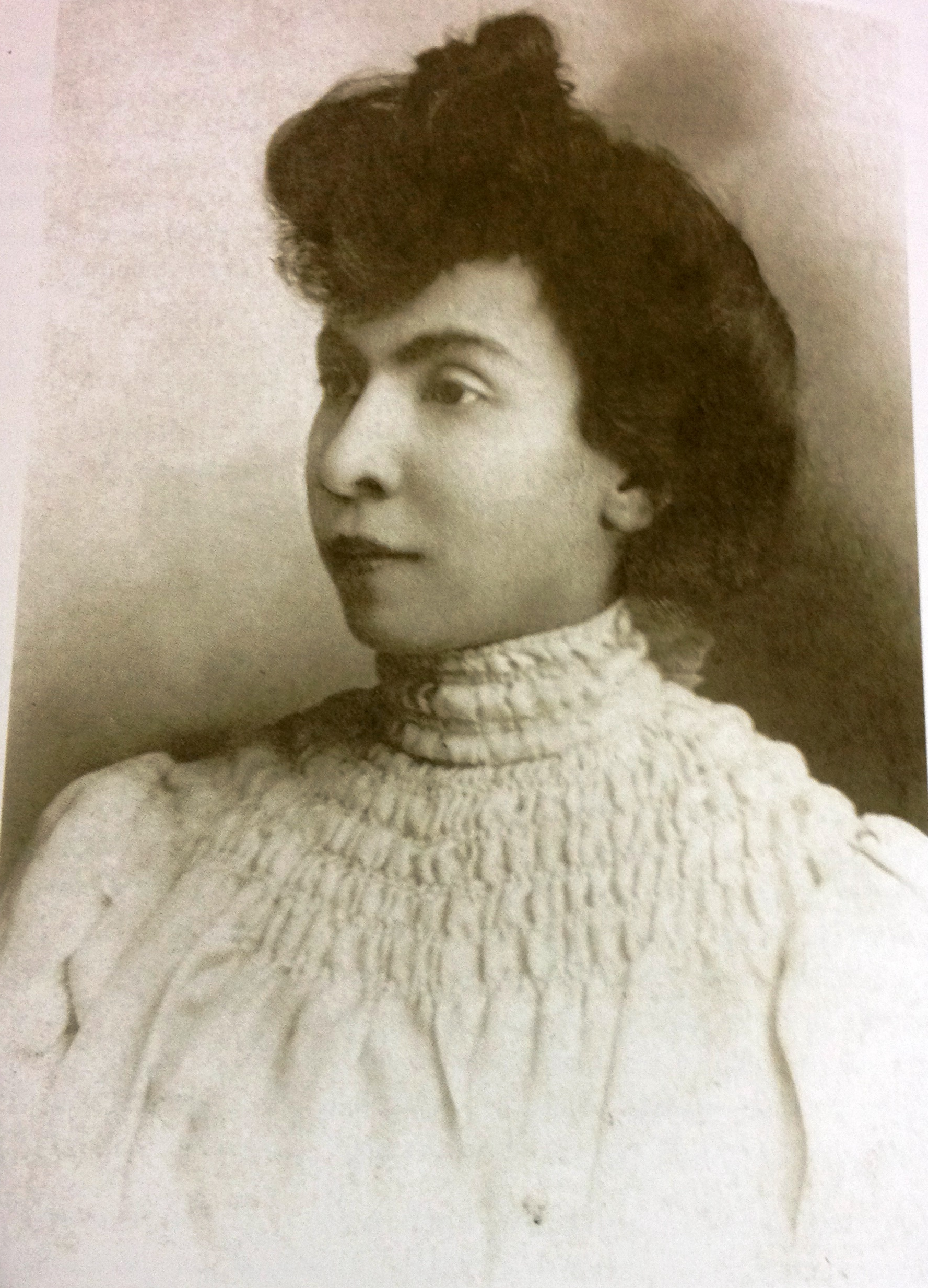 Escritora, activista de derechos humanos y feminista ecuatoriana.